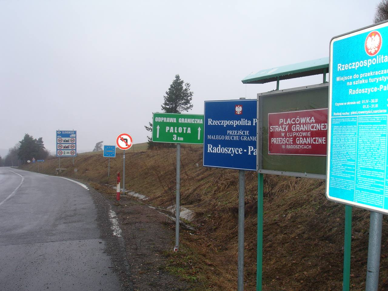 Przejscie graniczne Radoszyce - Palota, rowerowo-samochodowe